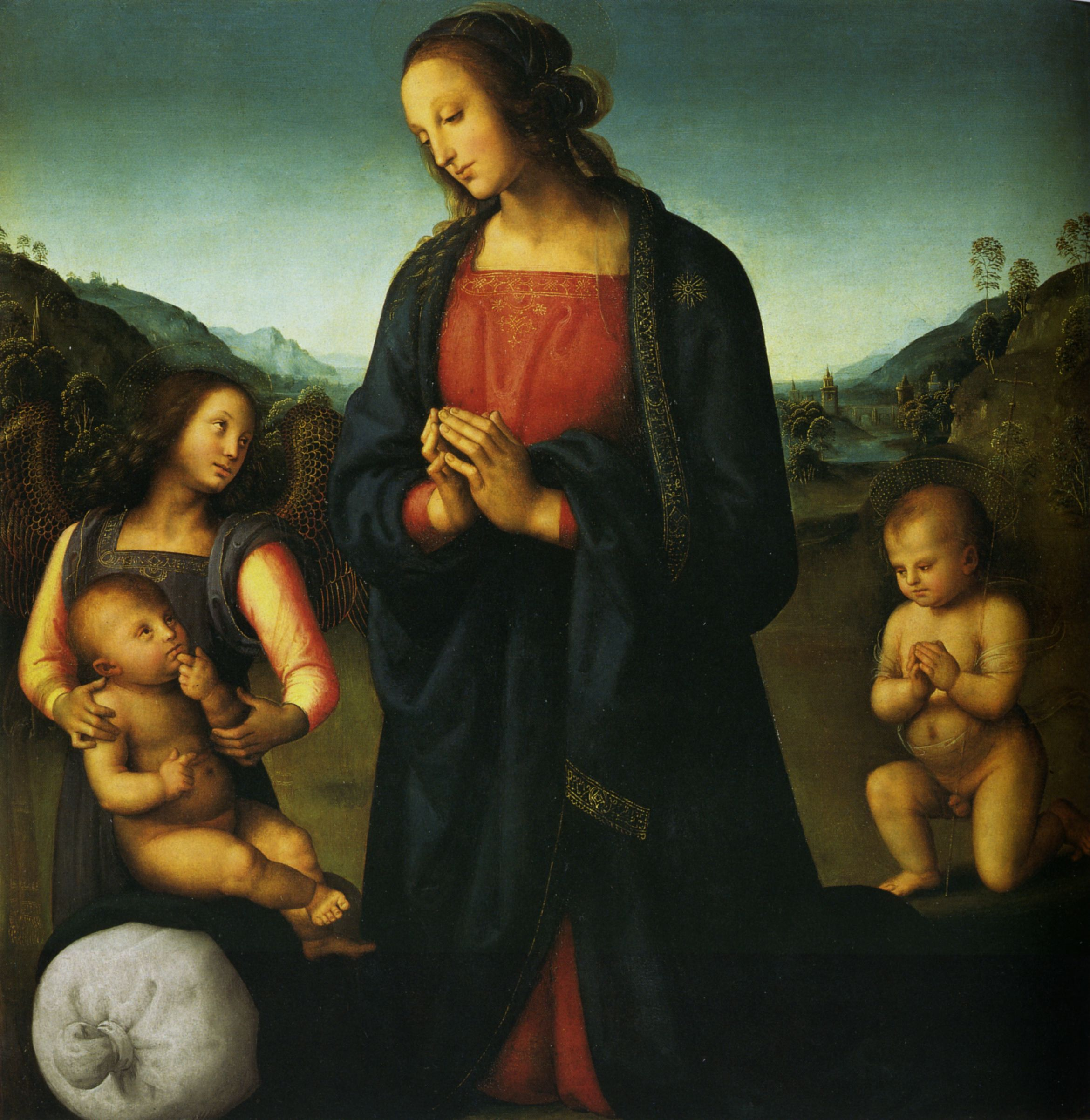 Vergine col Bambino, San Giovannino e un angelo